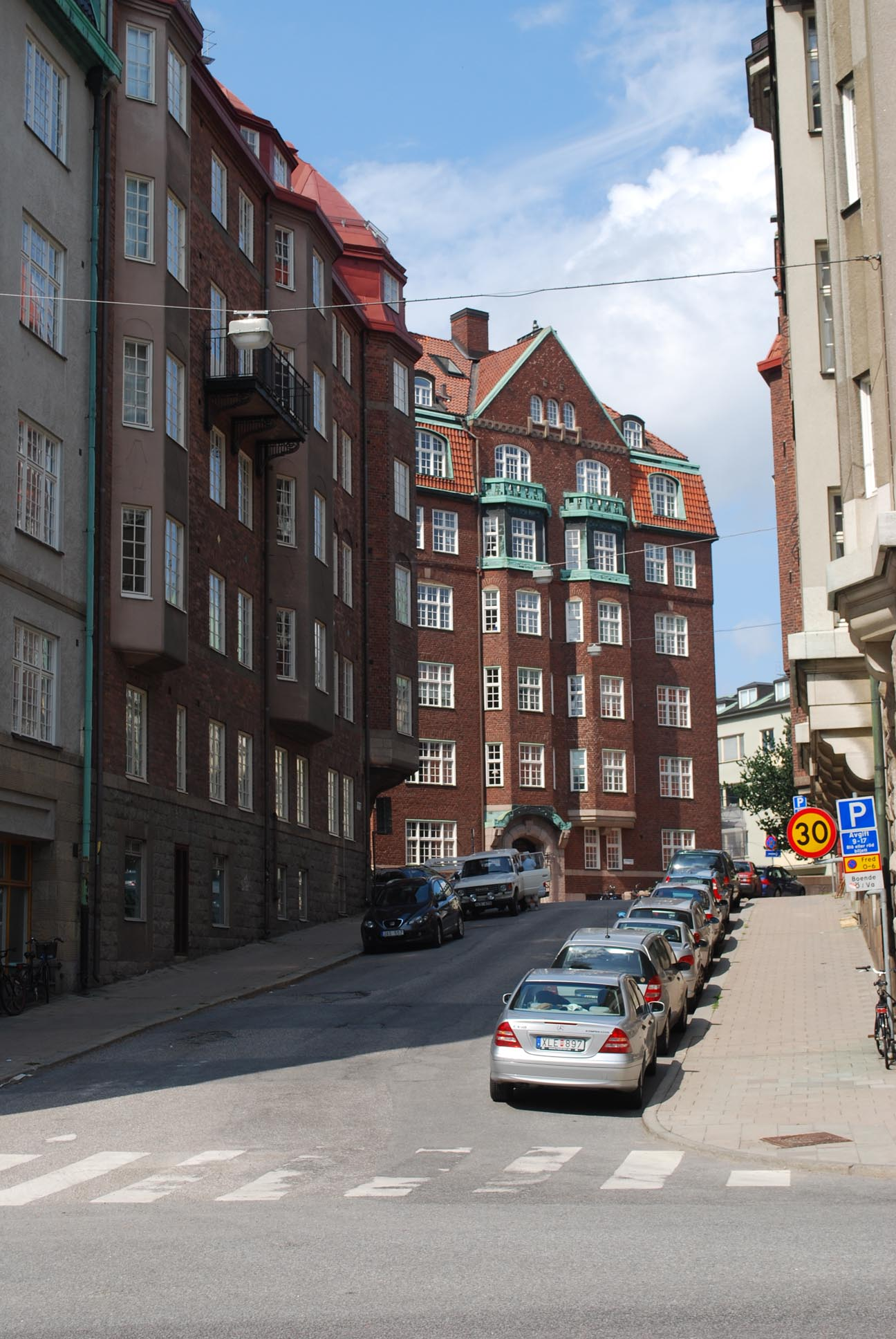 Stenbocksgatan sedd från Engelbrektsgatan i Stockholm. Huset i fonden är Eriksbergsg 13, ritat av Rudolf Aborelius 1914